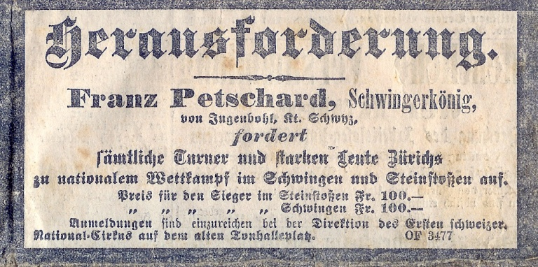 Zeitungsinserat vom Schweizer Nationalzirkus anno 12.. Mai 1900 mit Betschart Franz aus Ingenbohl.